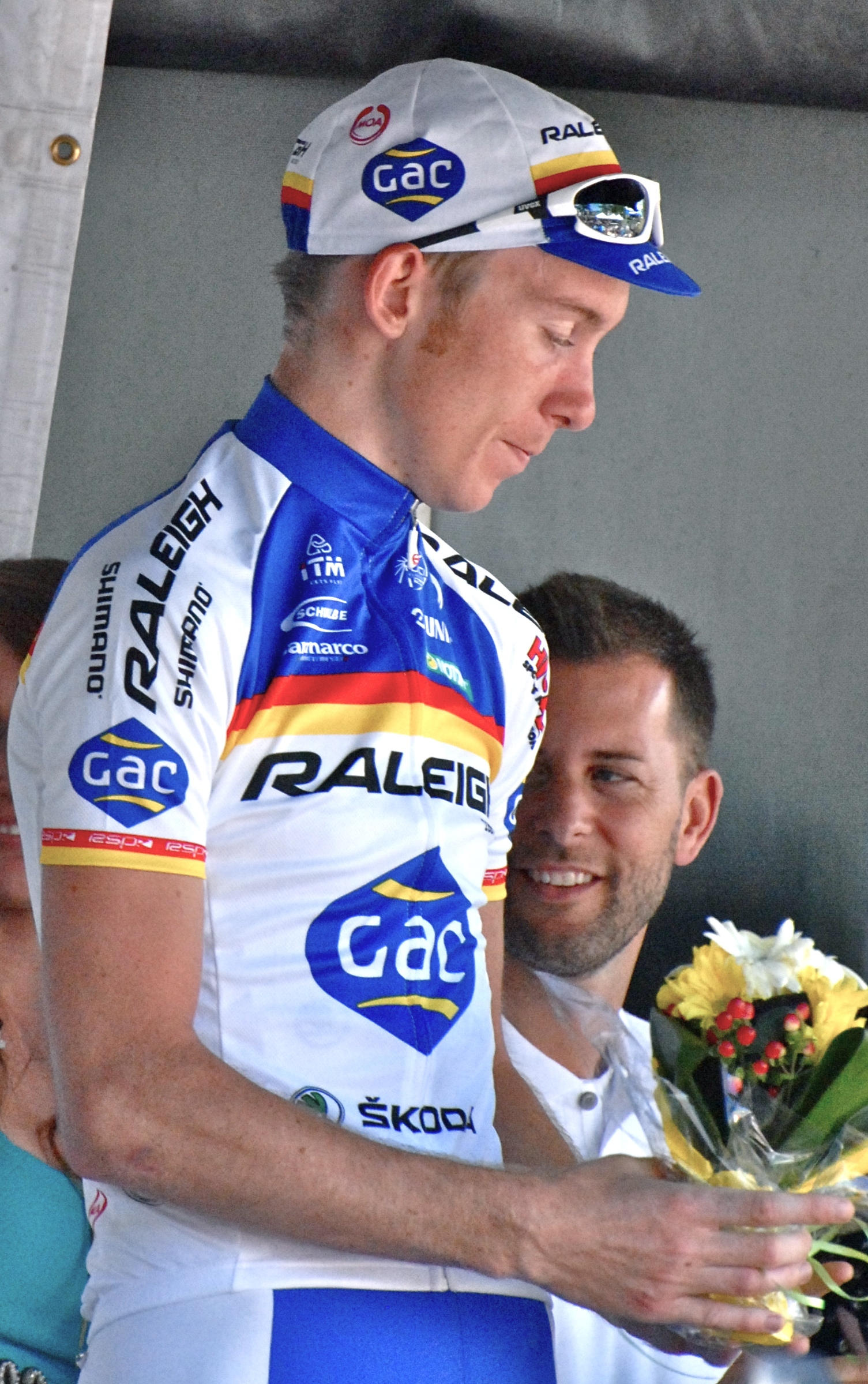 Russell Hampton prend place sur le podium après la cinquième étape du Tour de Beauce 2012, disputée le 16 juin 2012 à Québec, étape où il a terminé deuxième.